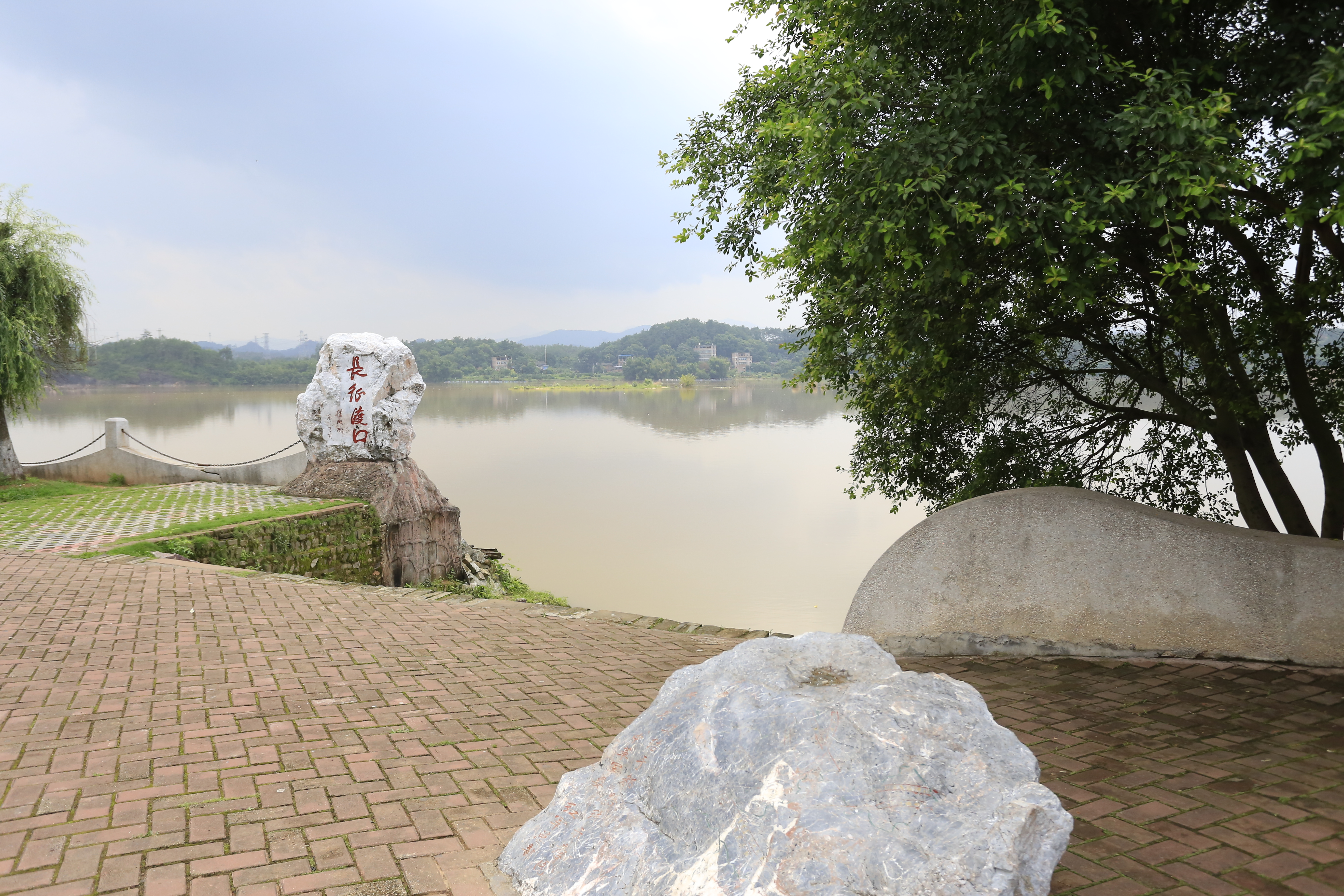 于都县中央红军长征出发地旧址——中央红军长征第一渡口（东门外渡口），中央红军长征出发地纪念园